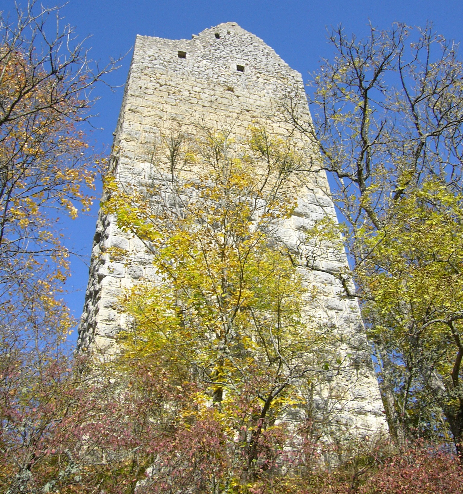 Das ist der Bergfried von außen. Fotografiert von Tobias Frech am 6. Oktober 2007 ca.14 Uhr.